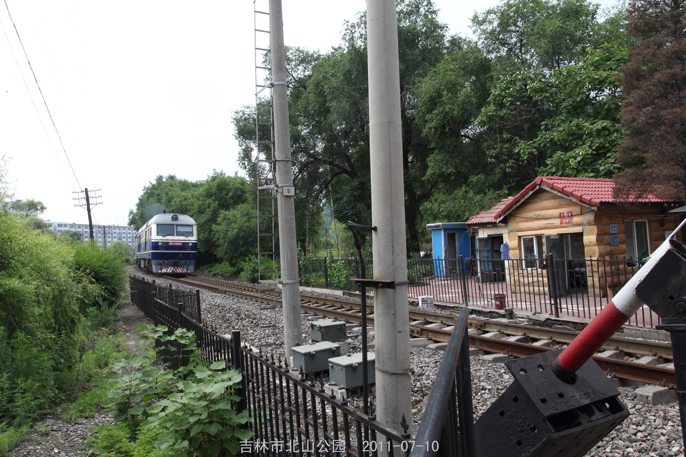 火车穿过北山公园 Bei Shan Gong Yuan